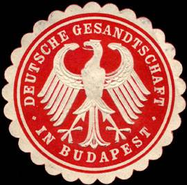 Sealing stamp Title: Deutsche Gesandtschaft in Budapest Description: rot, weiß, geprägt Place: Budapest size: 4 cm